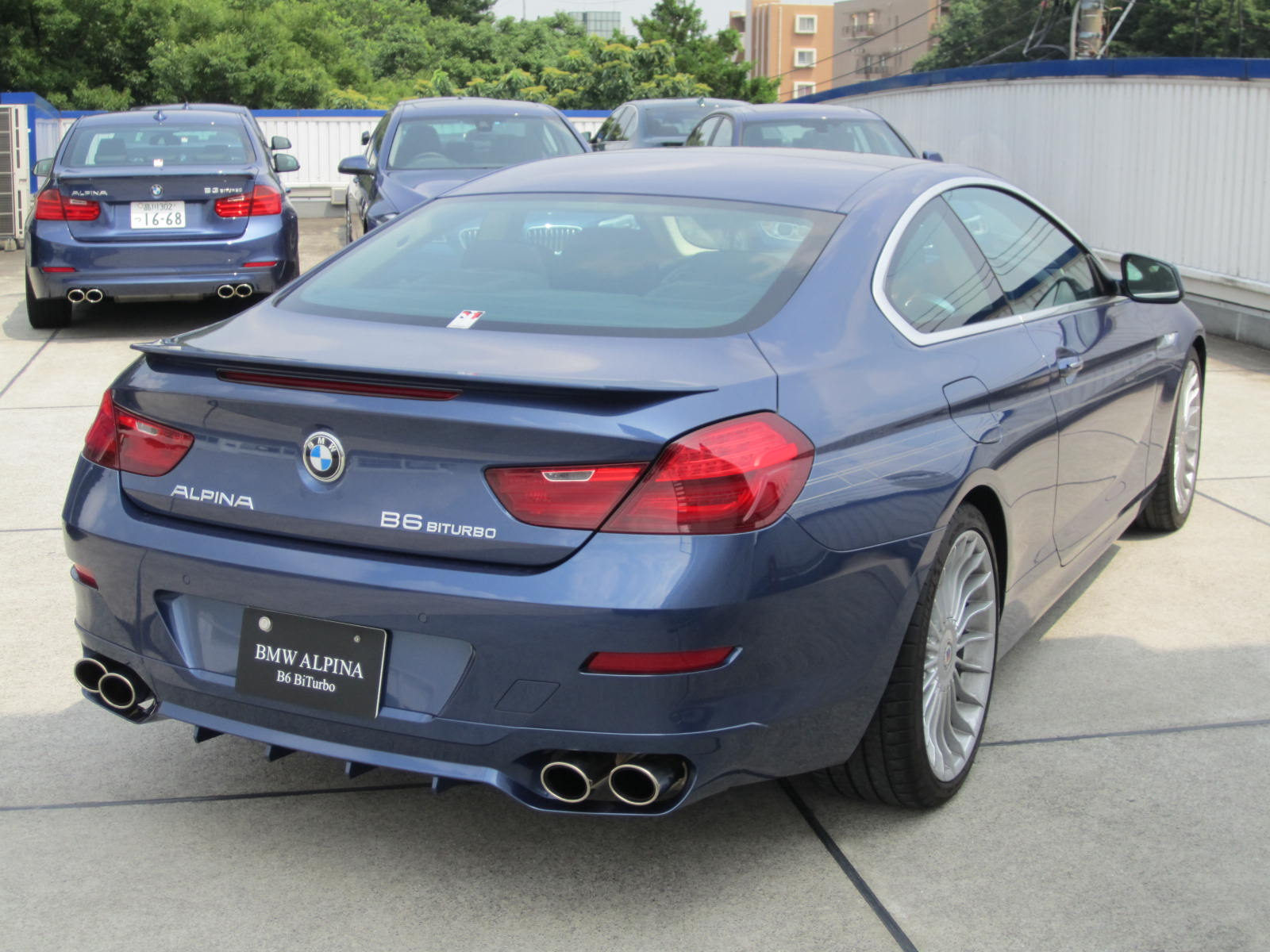 B6クーペリア